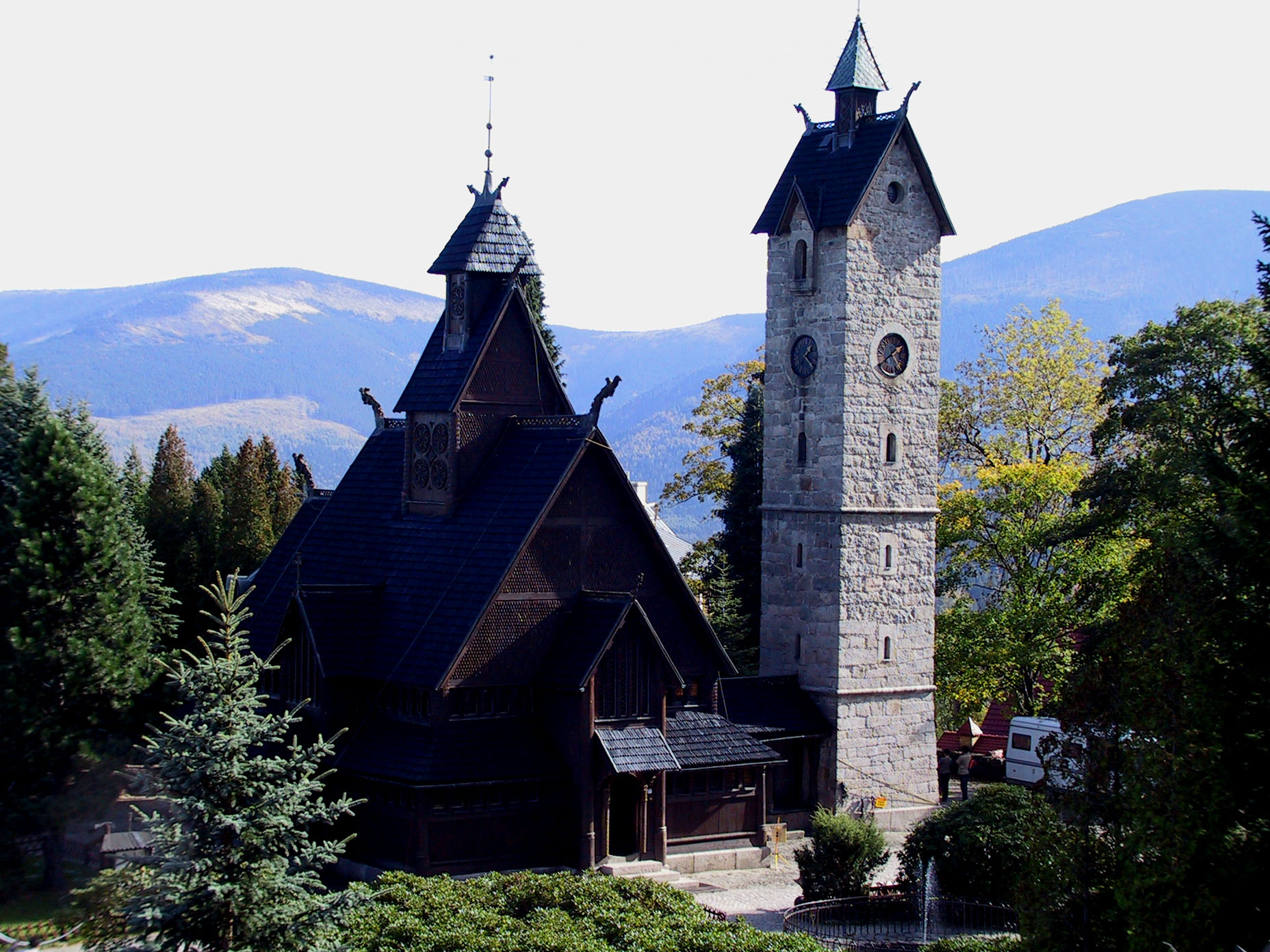 Kościół Wang